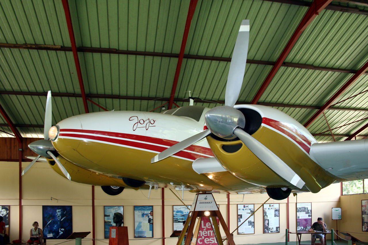 Jojo, avion de Jacques Brel exposé dans l'Espace Jacques Brel à Atuano (Hiva Oa)